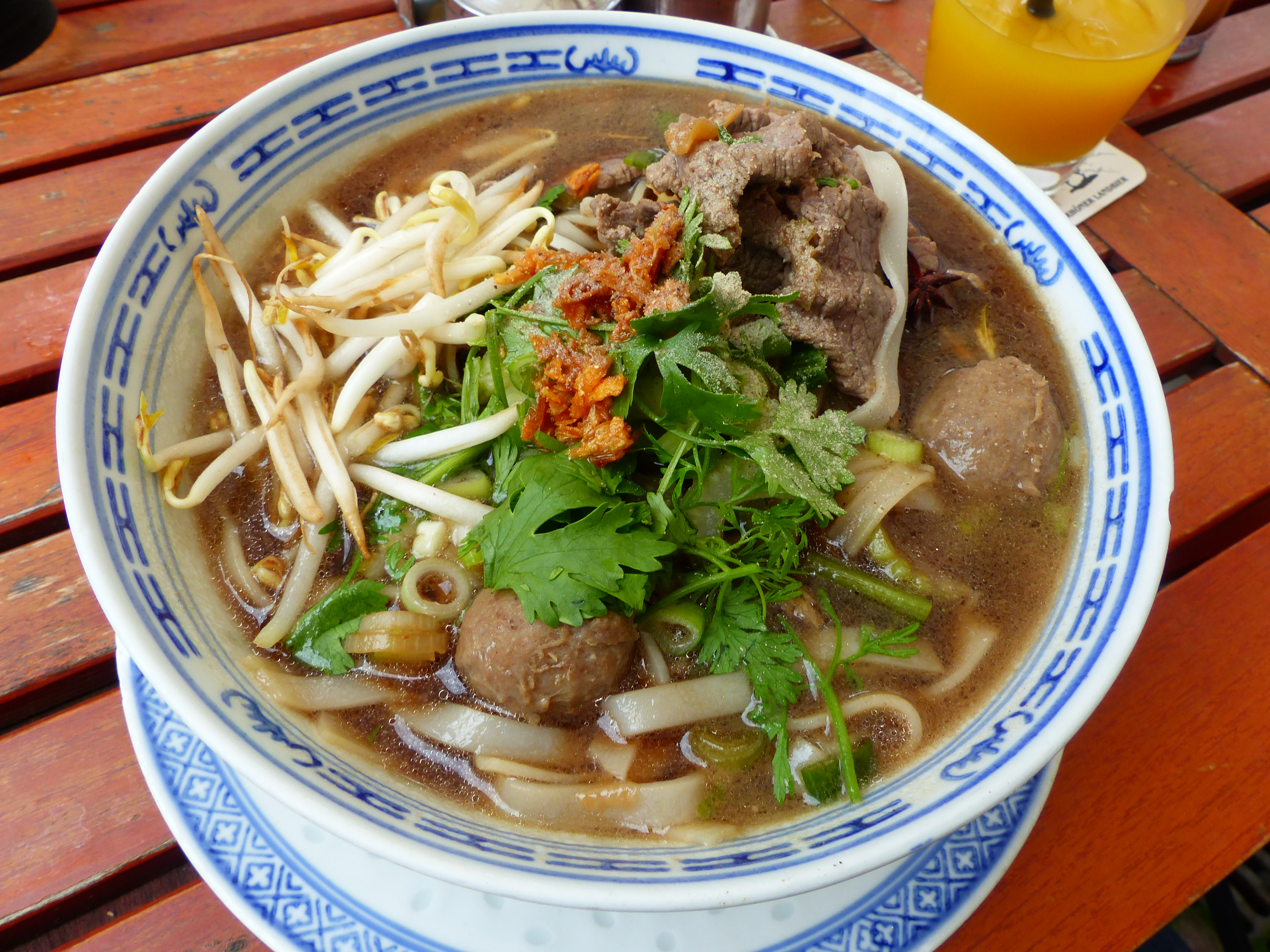 Guay Tiau - Thailändische Nudelsuppe mit Schwein und Fleischbällchen in einer Brühe mit Wasserspinat, Stangensellerie, Sojasprossen, Lauchzwiebeln, Koriander und Thai-Basilikum; Restaurant CHAANG NOI, Fulda